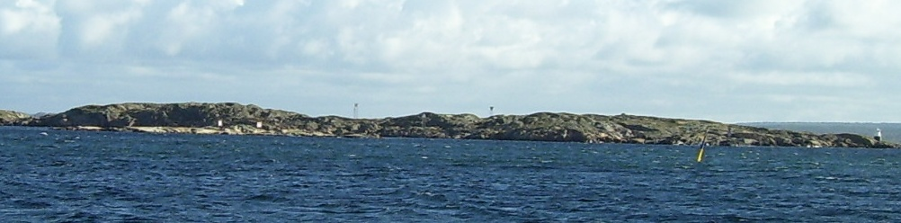 The island Oxskär north of Käringön, Orust, Sweden